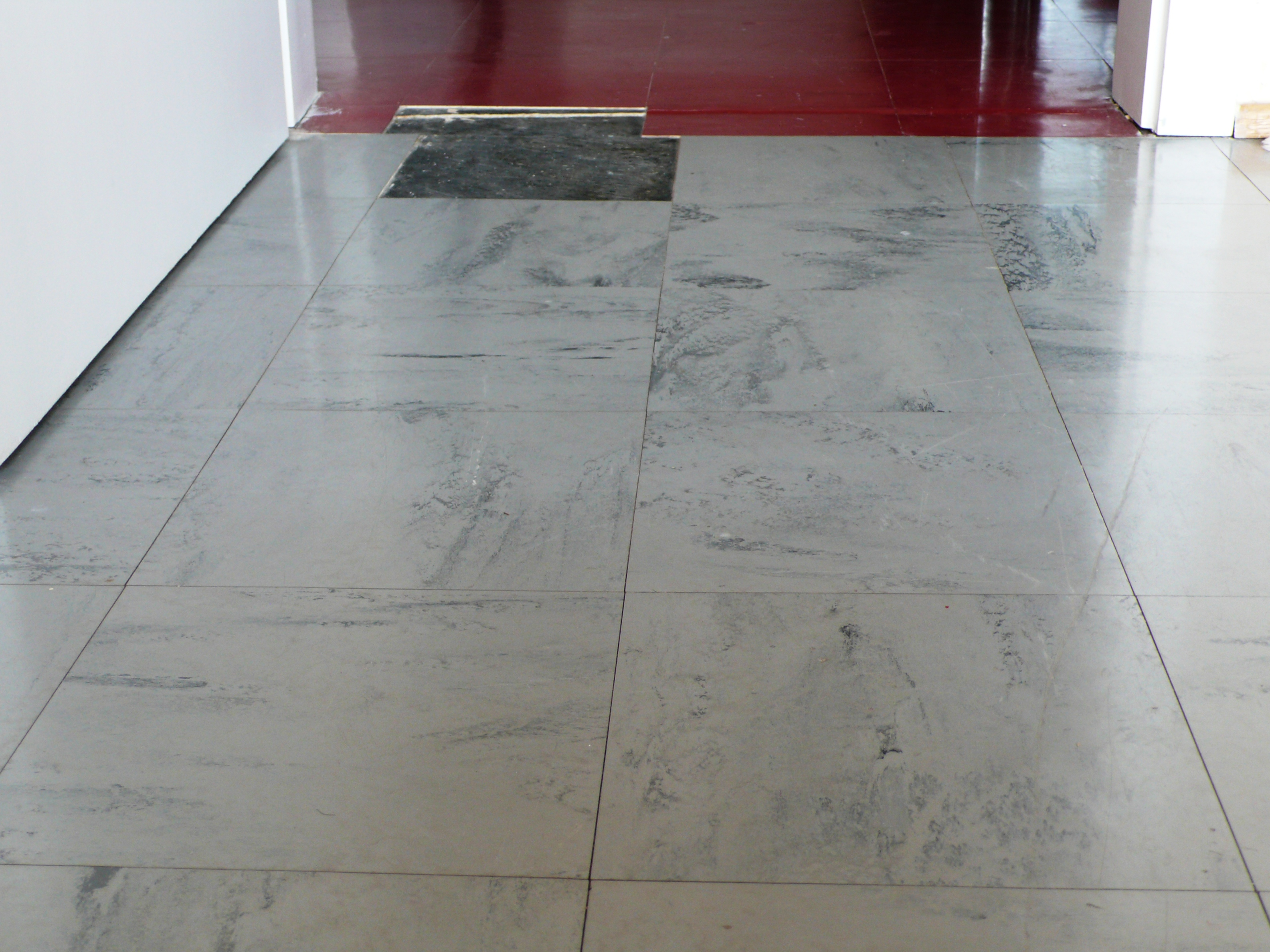 Vinyl-Asbest-Platten mit der Handelsbezeichnung Dunloplan Pastell-Polyflex